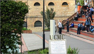 Campus